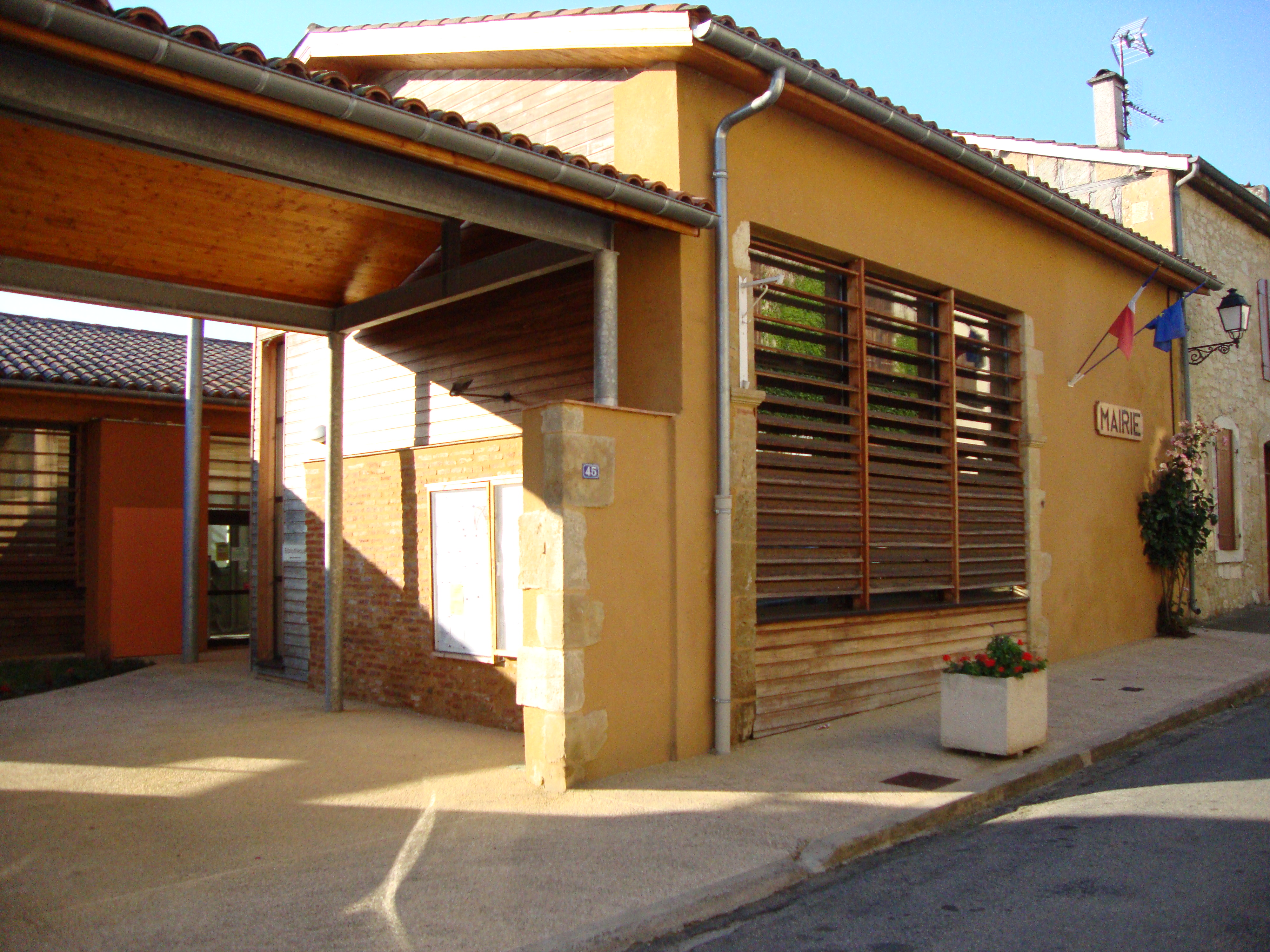 Barran (Gers, Fr) mairie